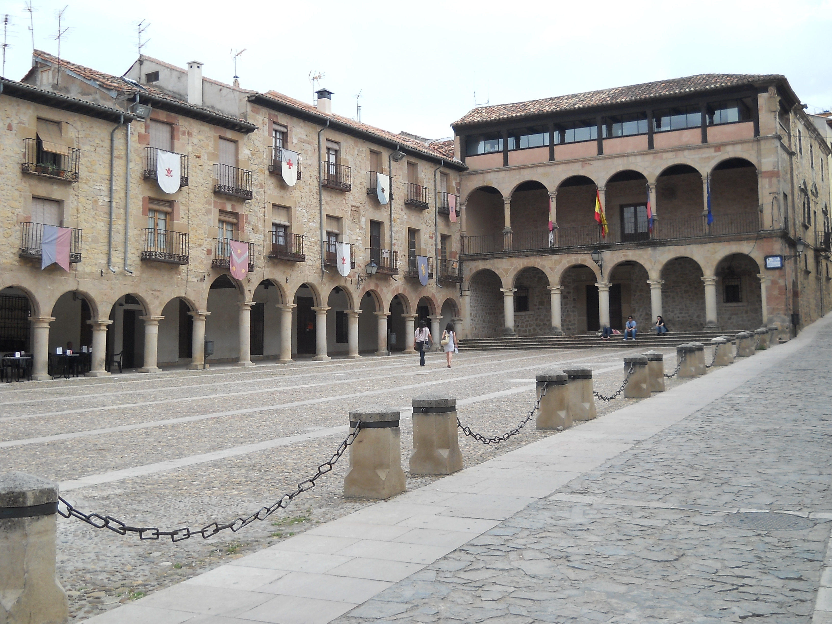 Plaza Mayor, Sigüenza, Guadalajara, España